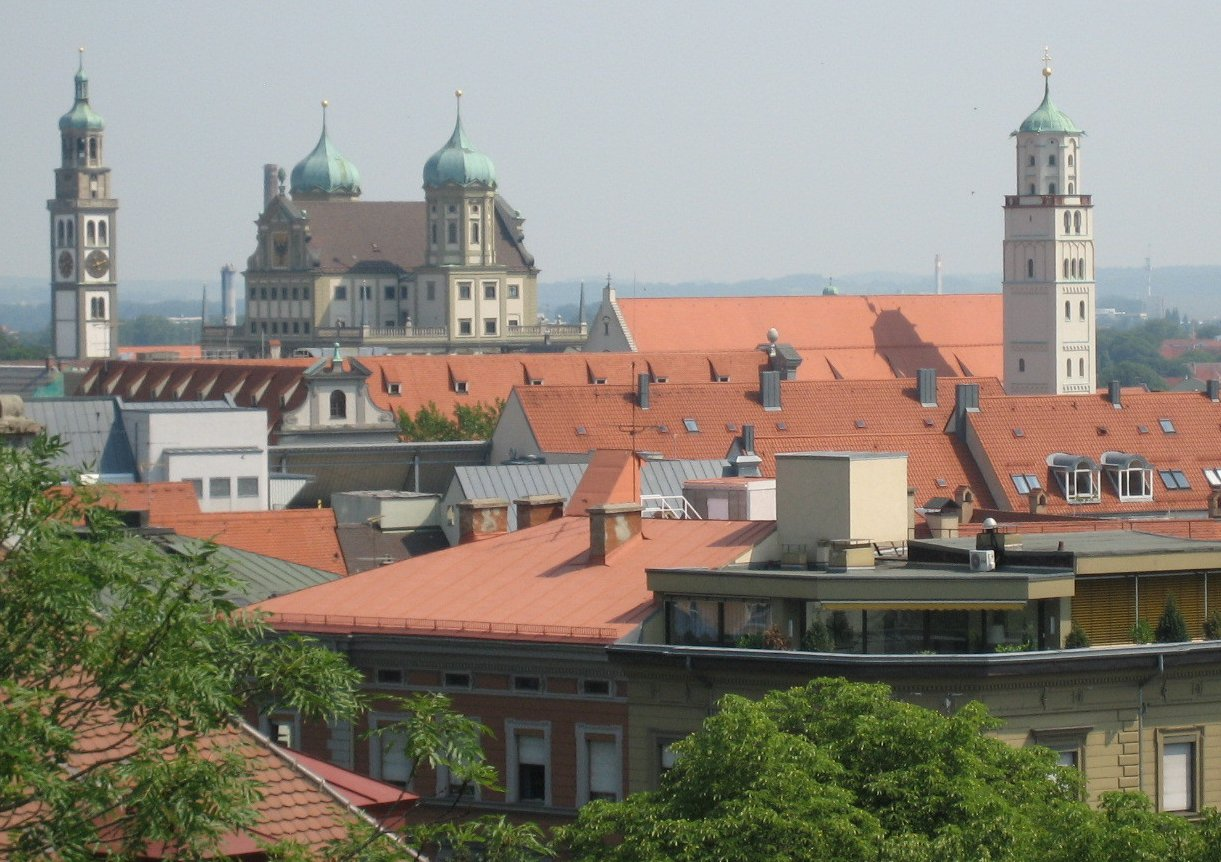 Blick über die Innenstadt von Augsburg, in Richtung Perlachturm und Rathaus und die Moritzkirche